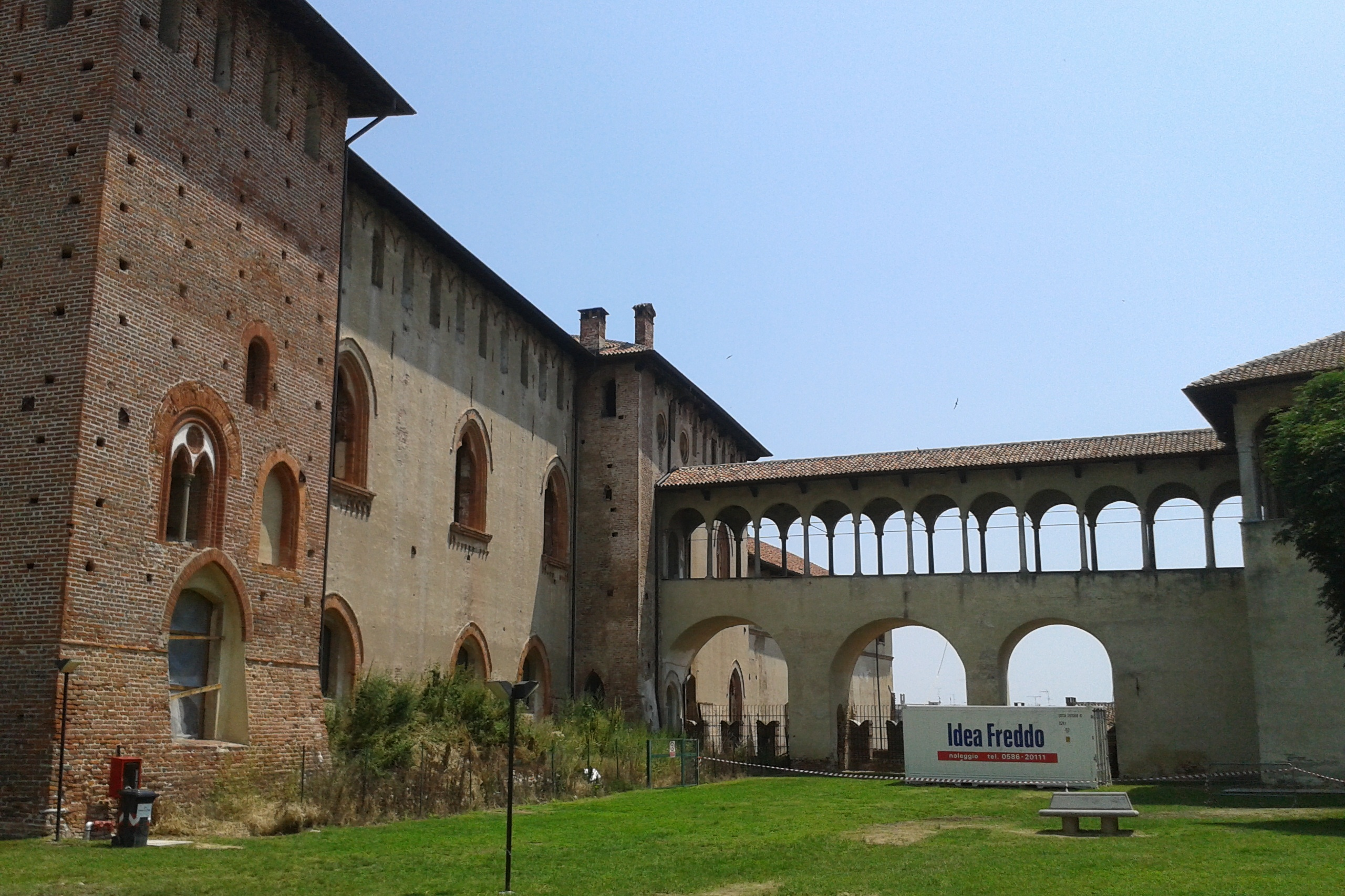 Castello Sforzesco (Vigevano)